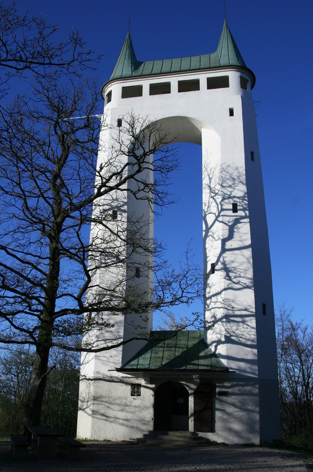 Schönbergturm bei Pfullingen